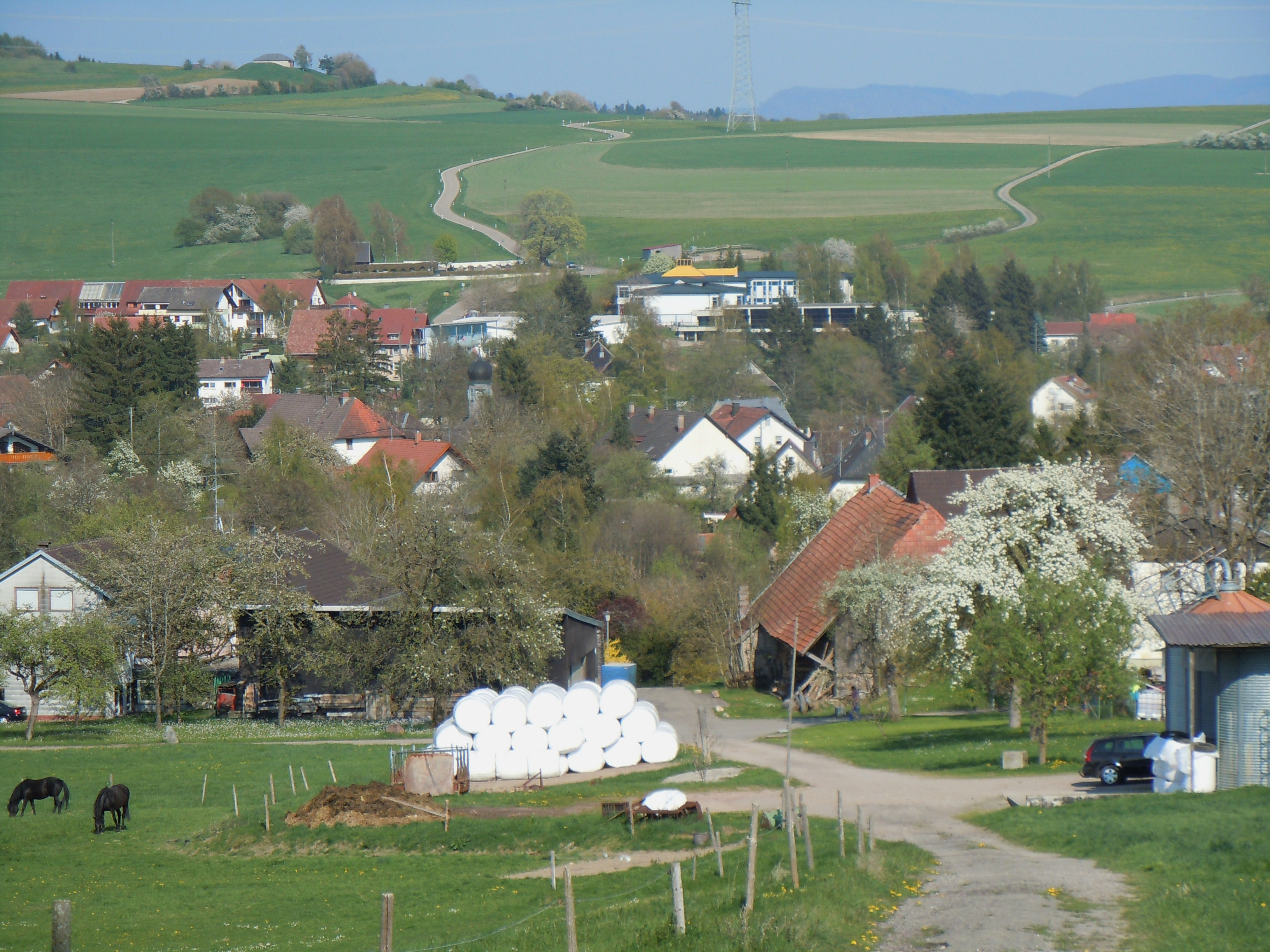 Ühlingen, Ortsteil, Baden-Württemberg